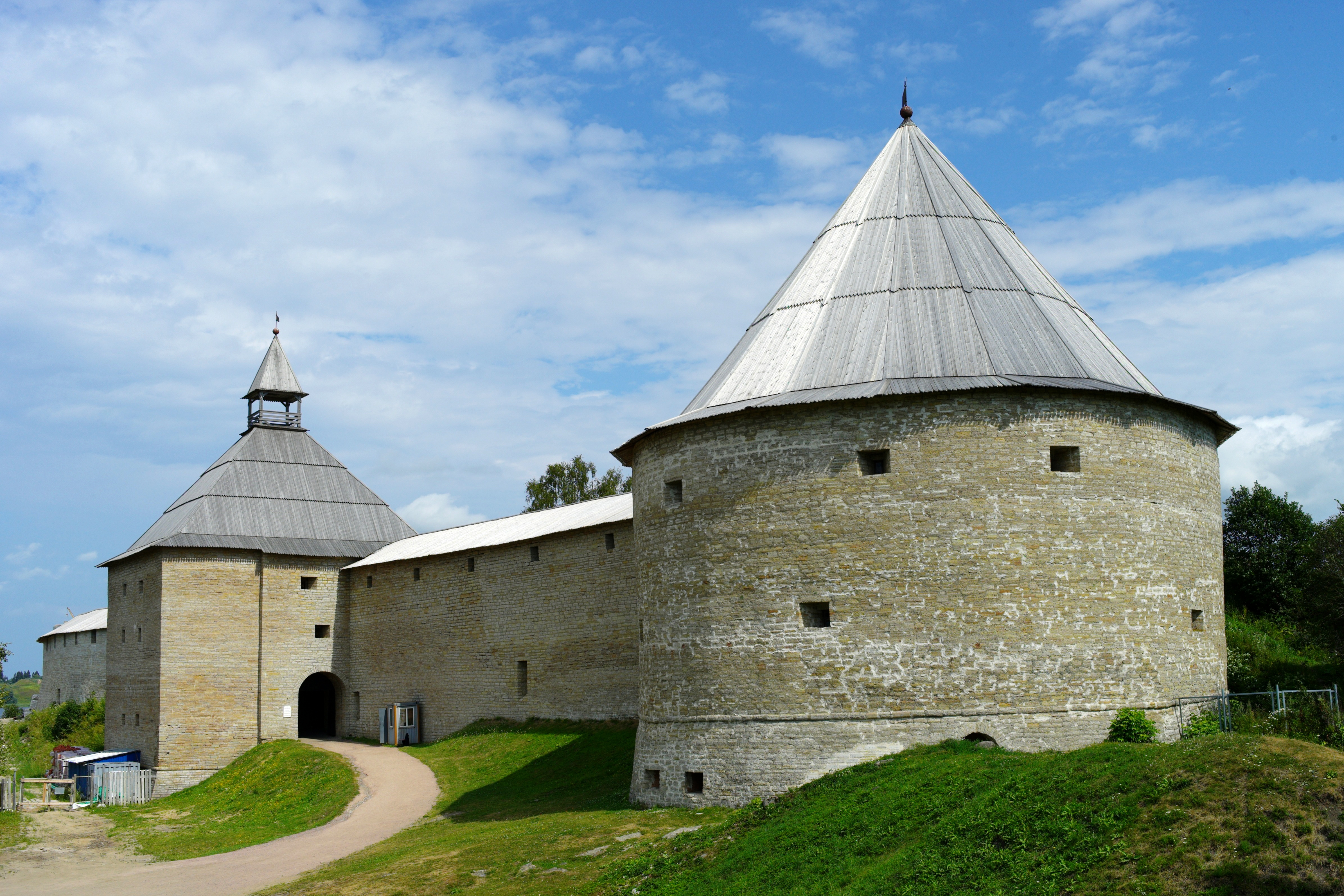 Крепость "Старая Ладога": Старая Ладога, Старая Ладога, Волховский район, Ленинградская область